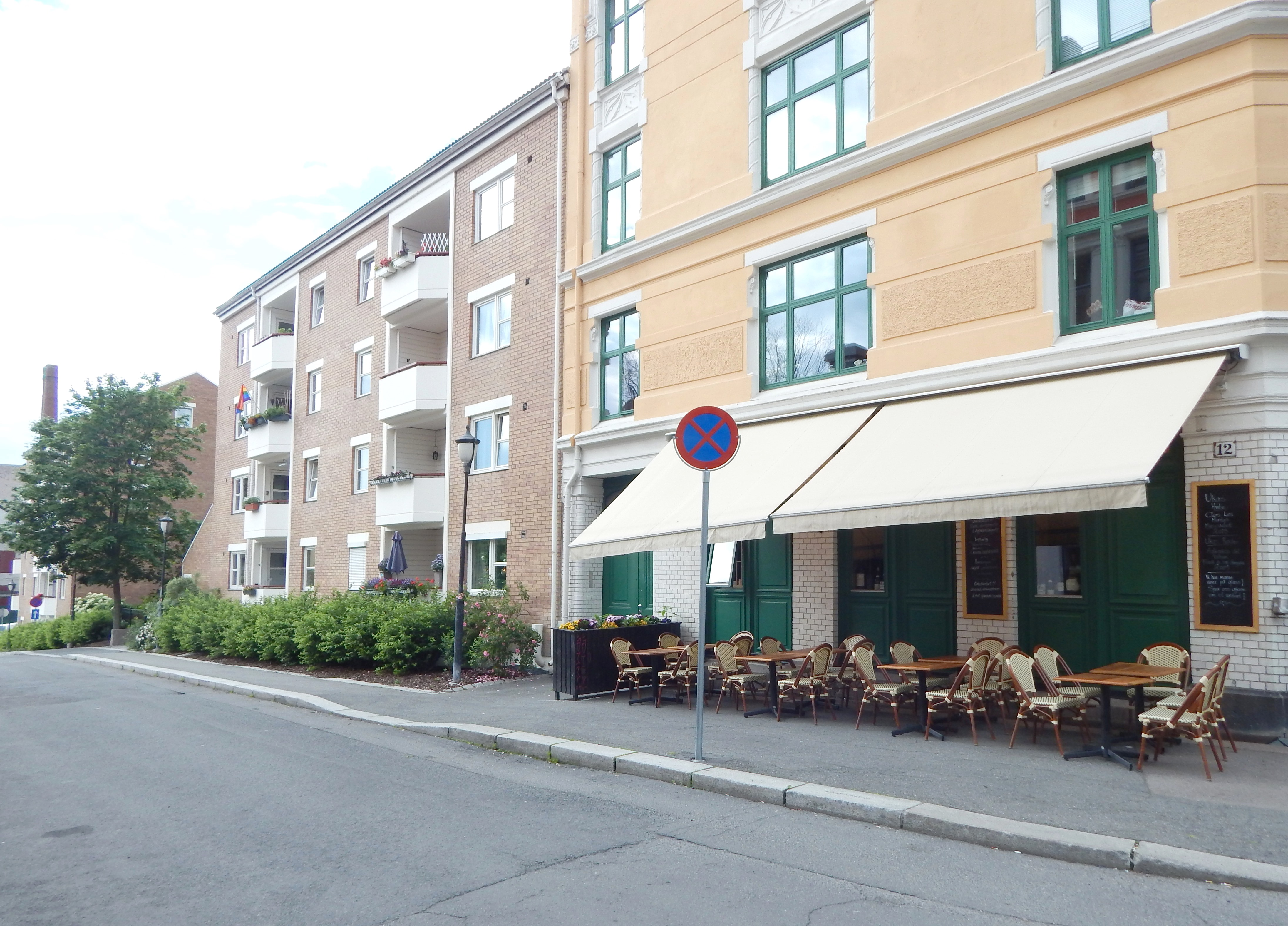 Torvbakkgata i enden mot Markveien, med Markveien mat- og vinhus (nr. 12). Arkitekt: Halfdan Strøm (1897–98). Listeført av Byantikvaren i Oslo.)